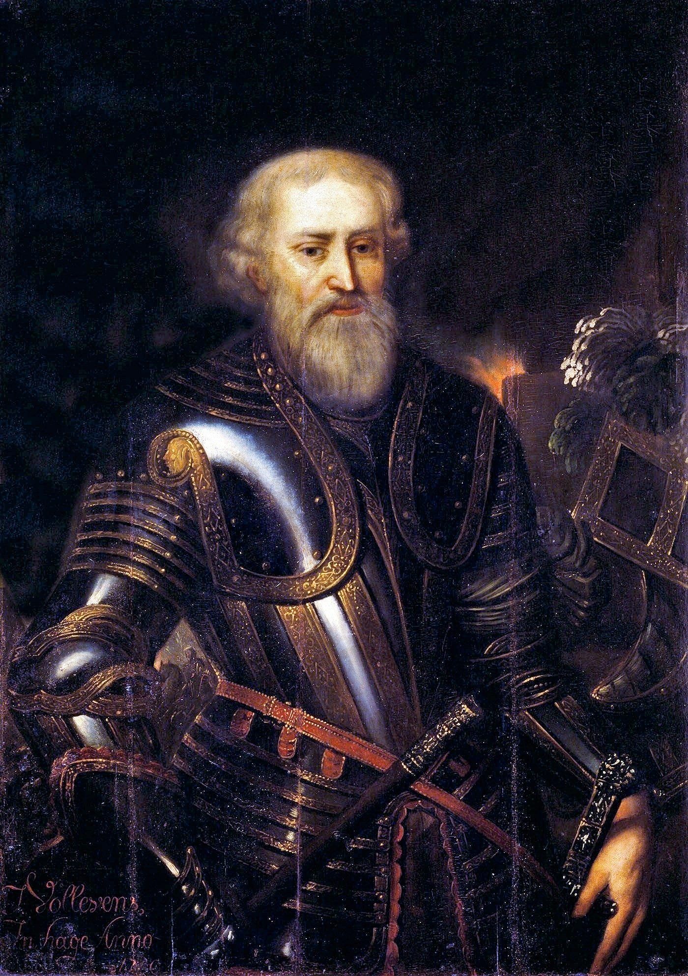 Artamon Matveev